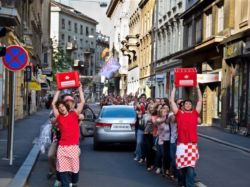 Zagreb